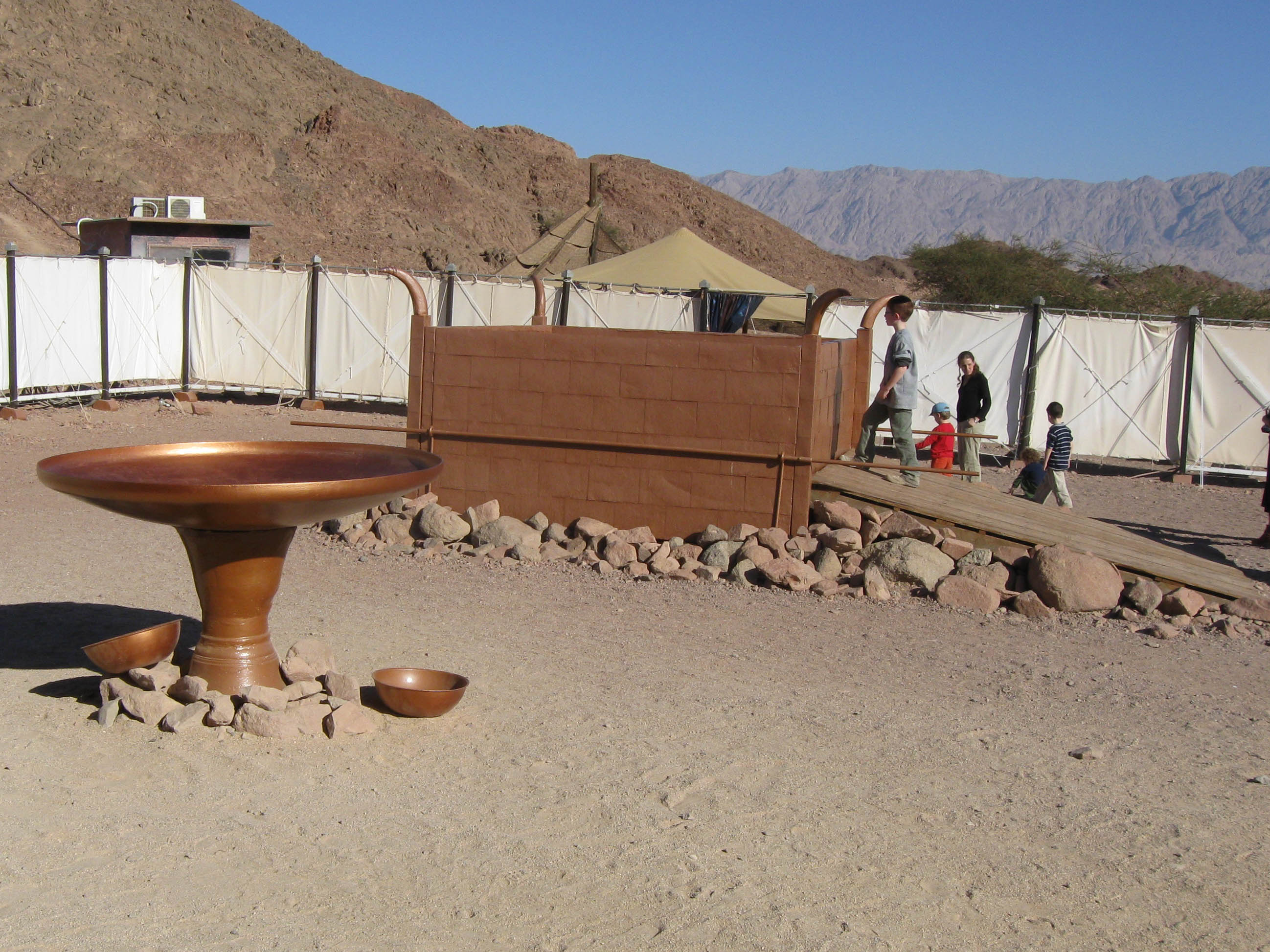 הכיור ומזבח הנחושת בדגם המשכן בתמנע